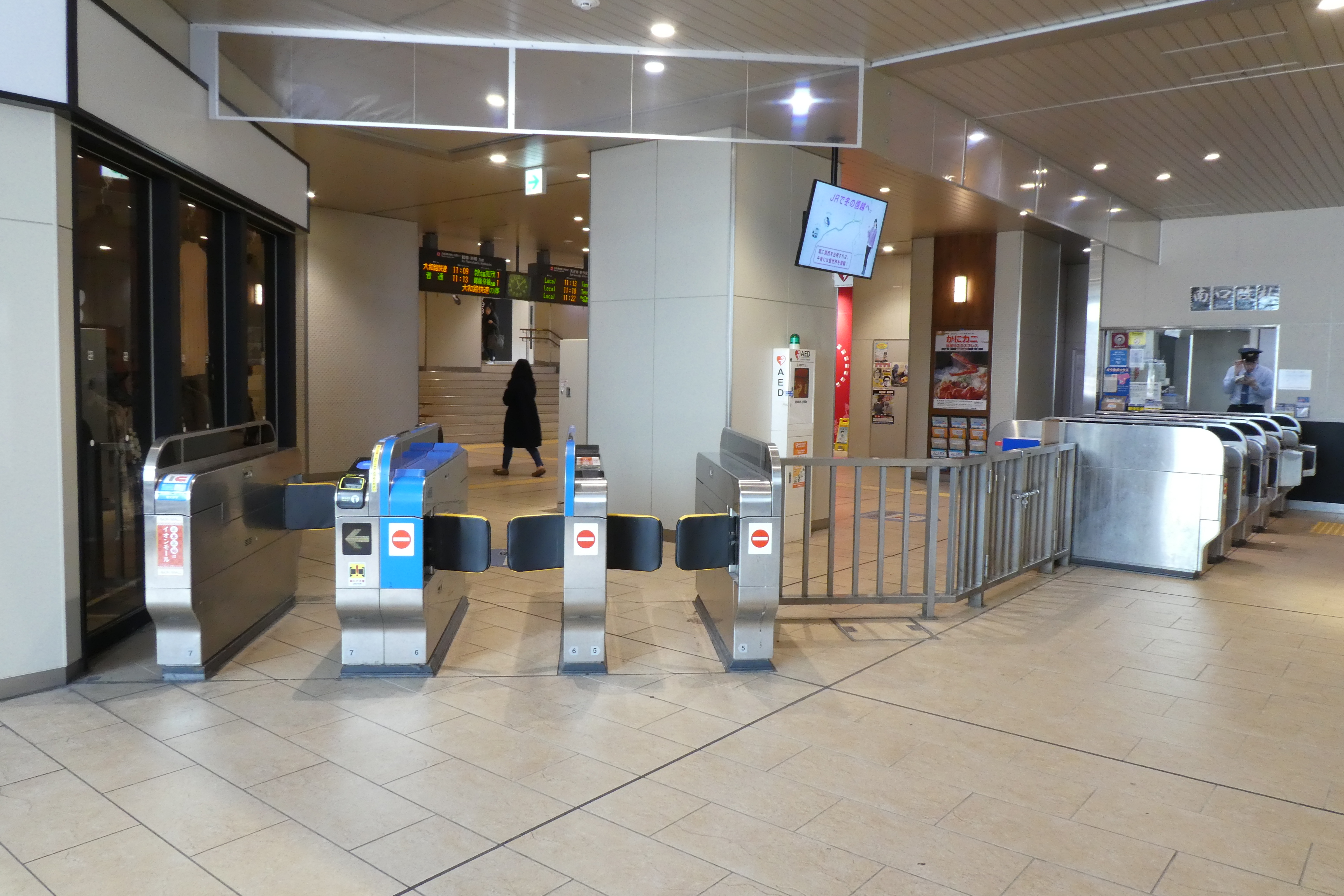 大阪環状線 桃谷駅 南口改札